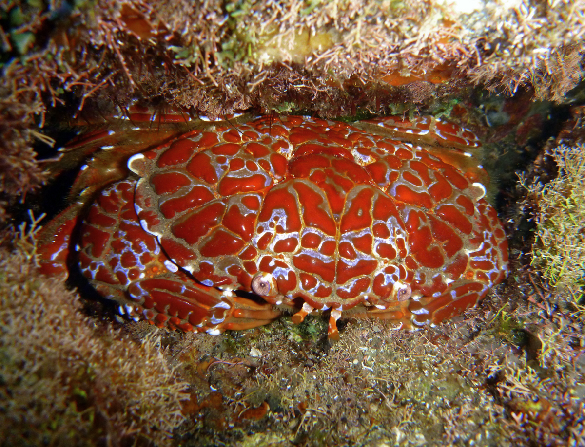 Un crabe Zosimus aeneus à la Réunion.